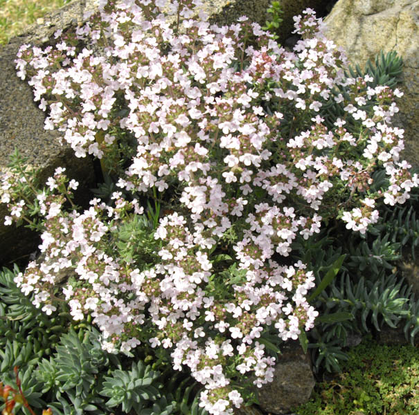 Thymus vulgaris